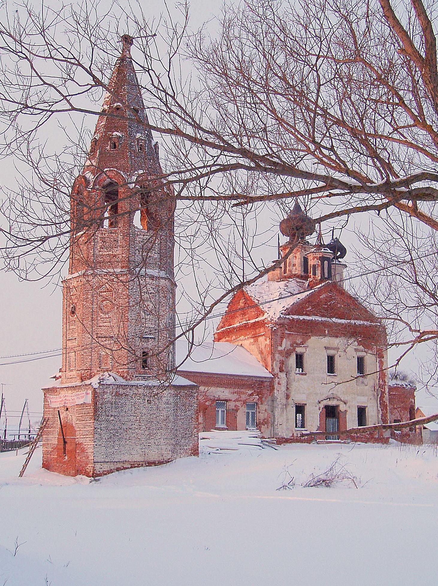 Церковь Николая Чудотворца в Каменках